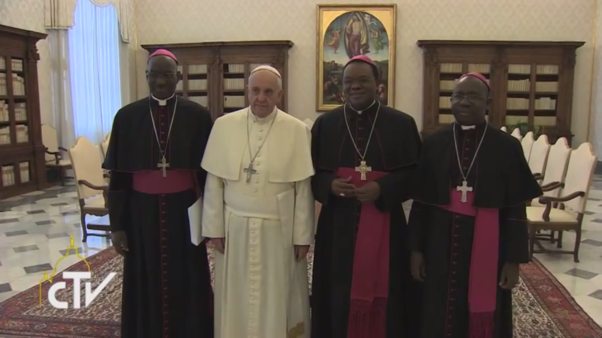 Visite ad limina de la conférence épiscopale guinéenne auprès du pape François le 24 mars 2014. Source : LE UDIENZE, 24.03.2014 sur le site press.vatican.va